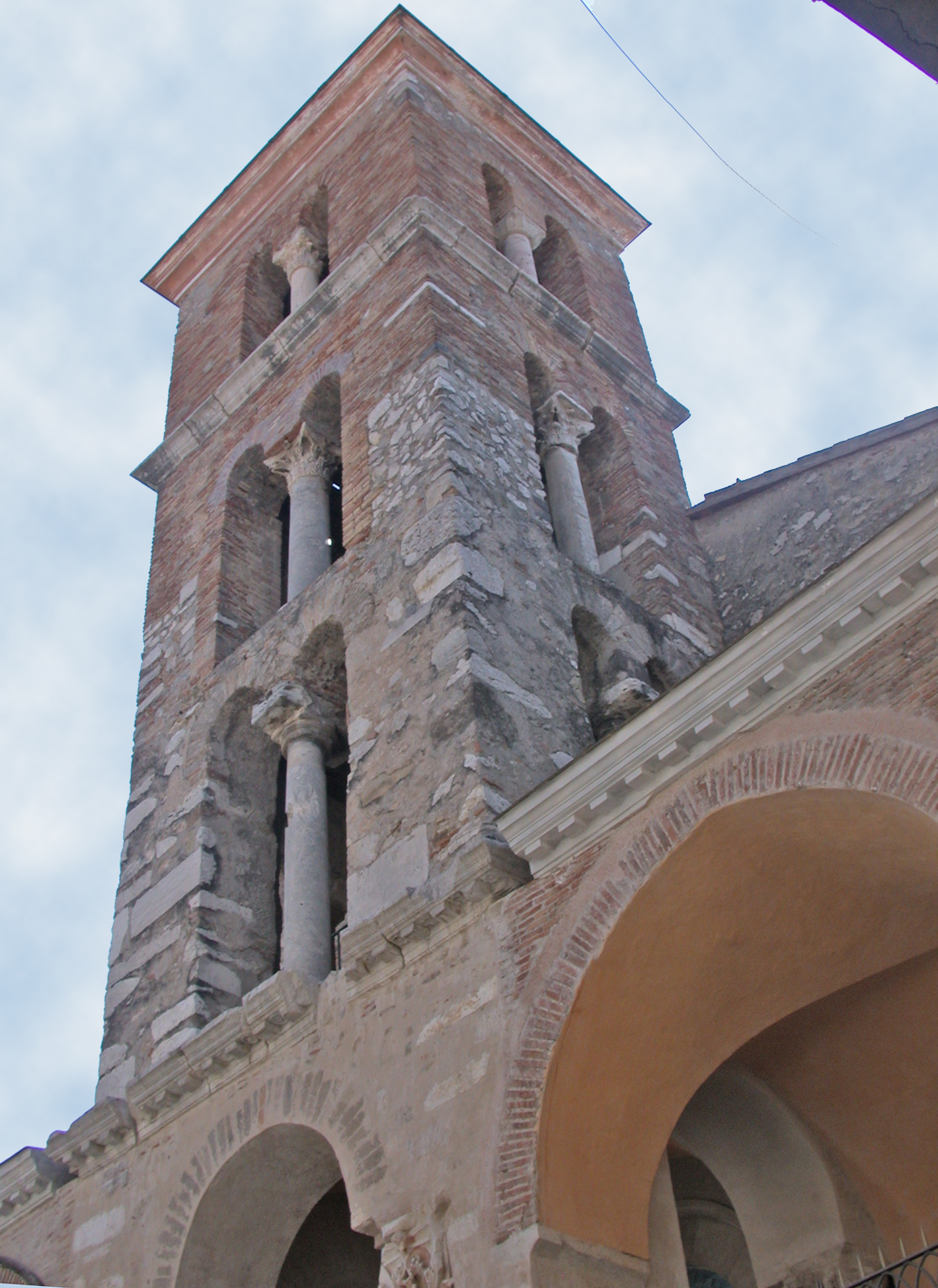 Italia, Lazio, Minturno, provincia di Latina, Duomo, scorcio della facciata